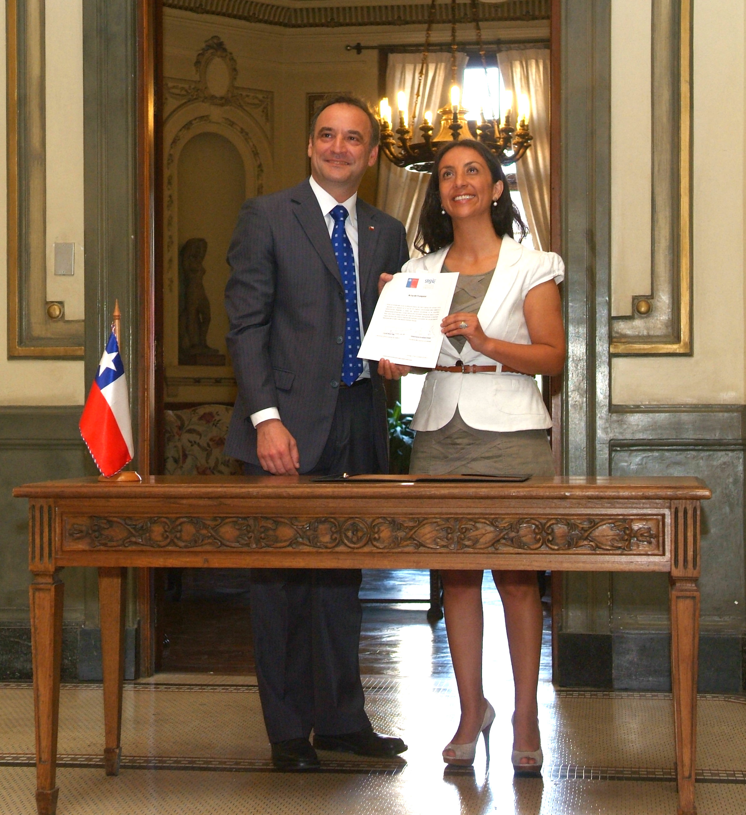 La Ministra Secretaria General de Gobierno, Cecilia Pérez junto al nuevo Intendente de Santiago Juan Peribonio.